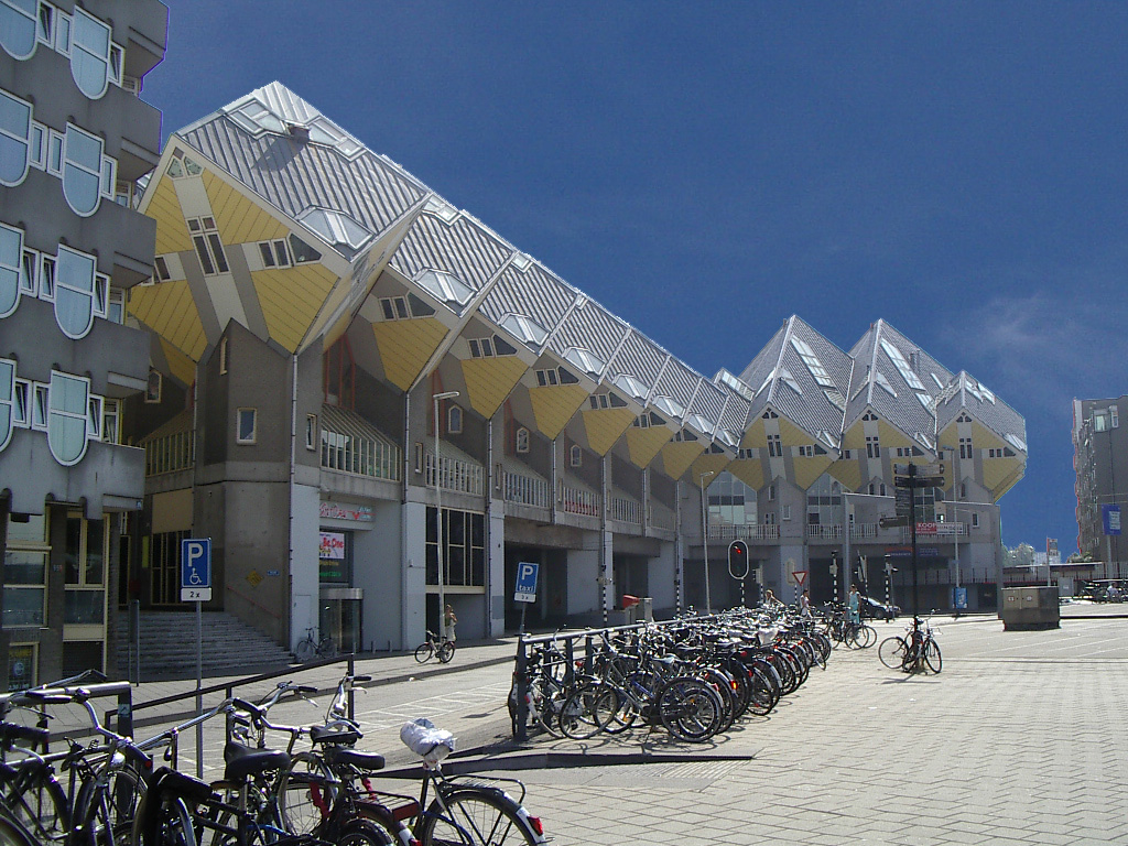 Cube House in Rotterdam, Netherlands